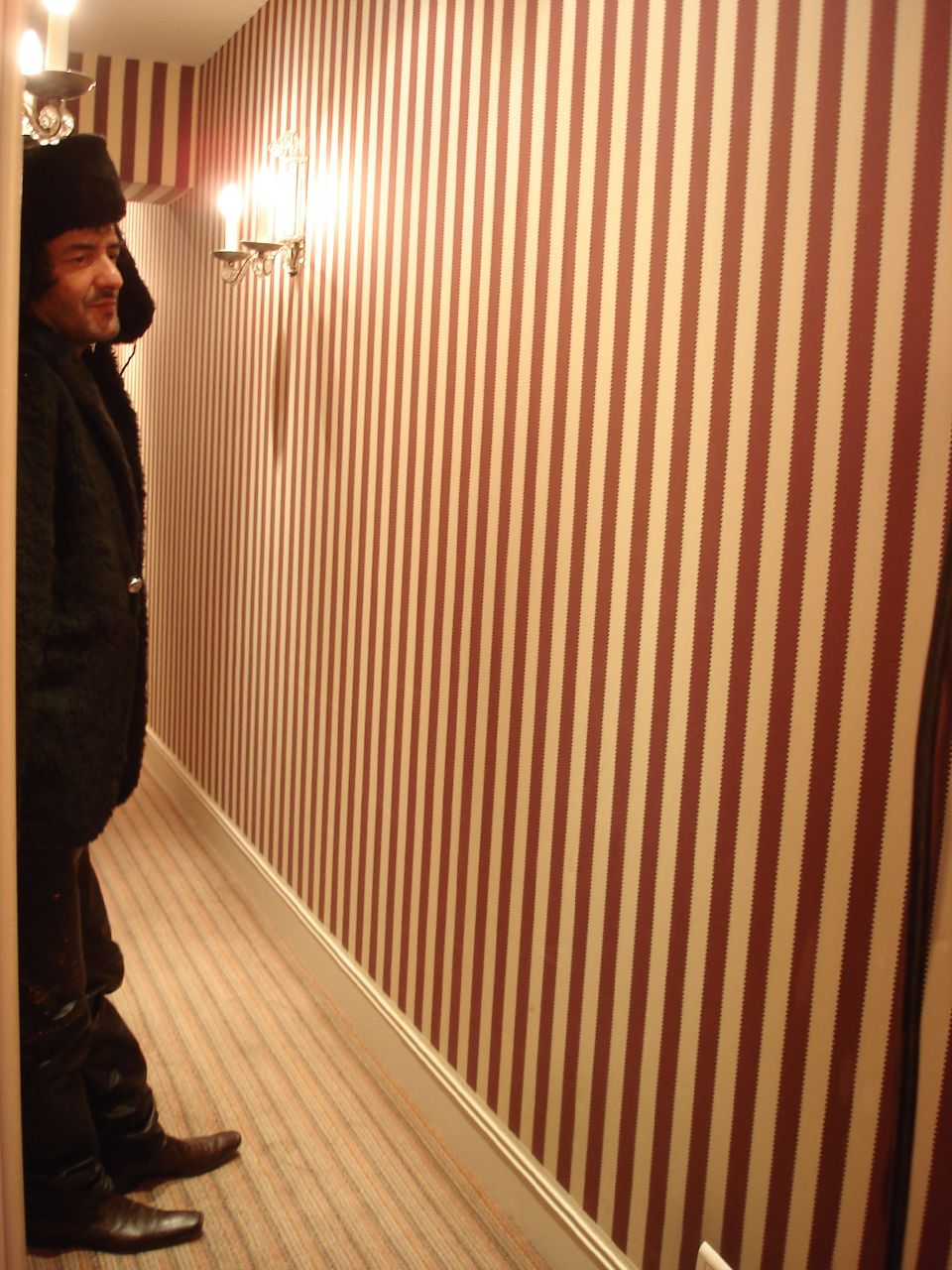 MorganeC